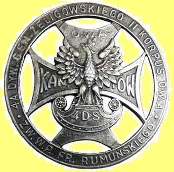 Odznaka 4 Dywizji Strzelców Lucjana Żeligowskiego